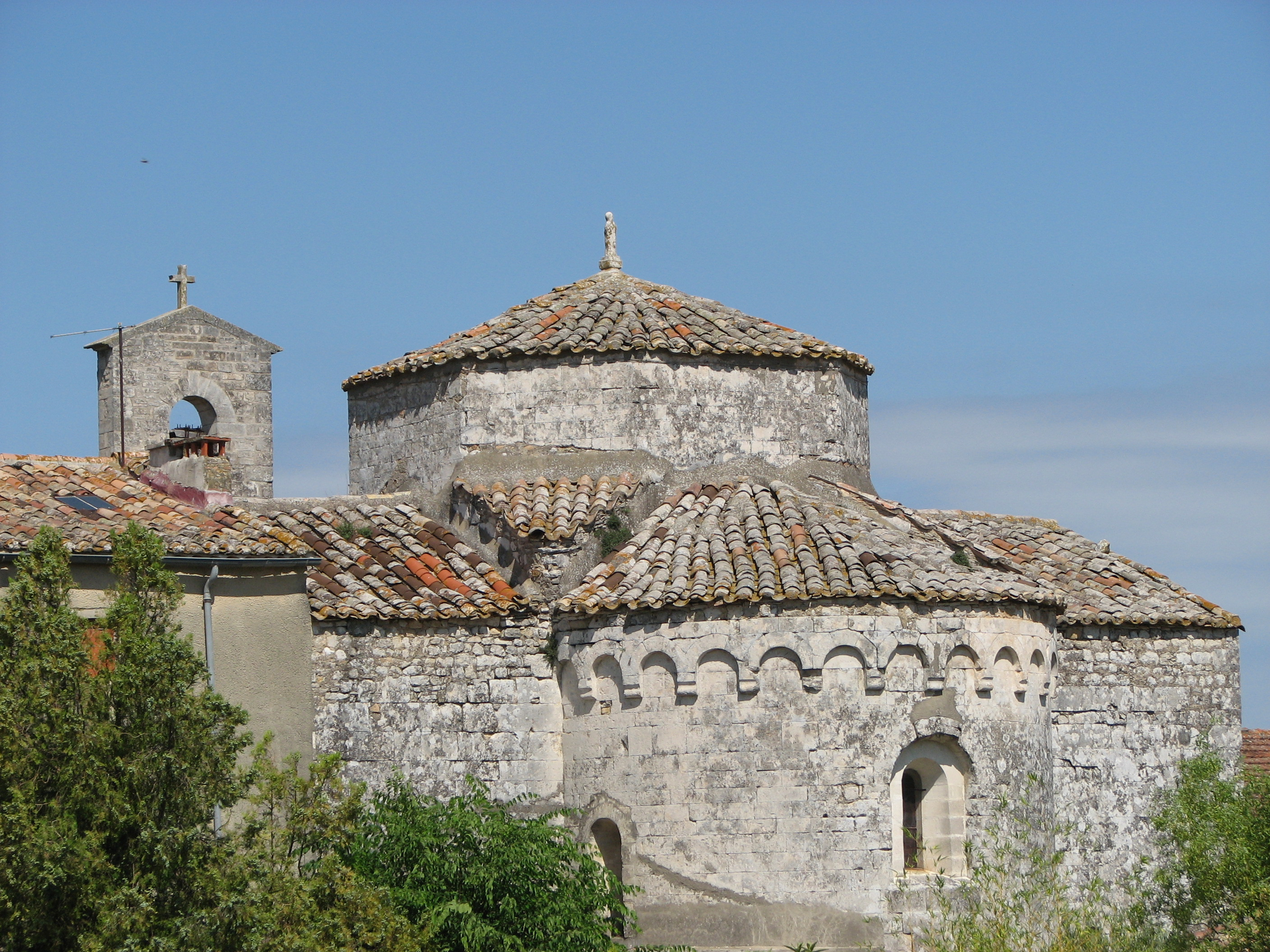 Église de Bourdic (Gard)